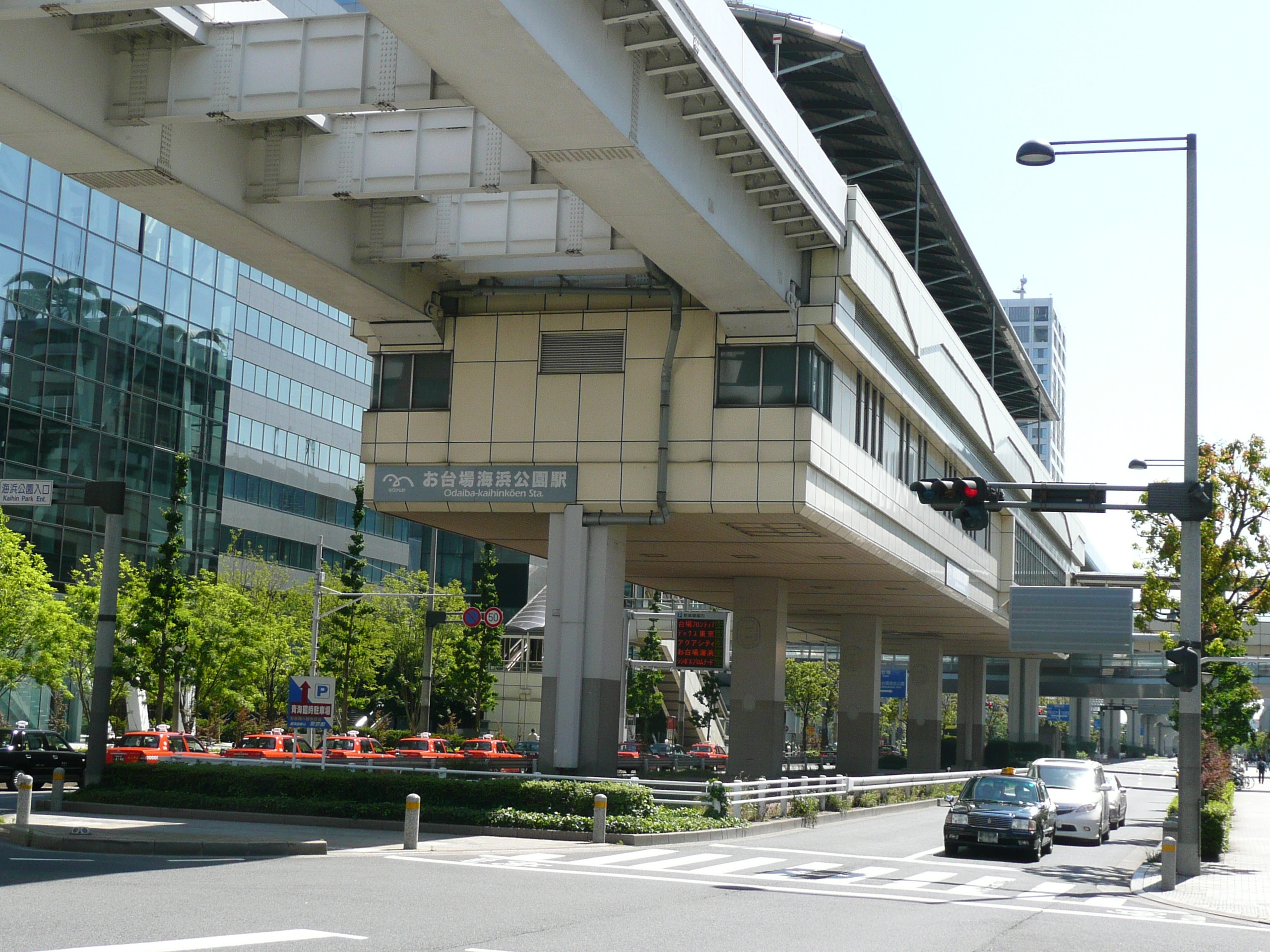 お台場海浜公園駅